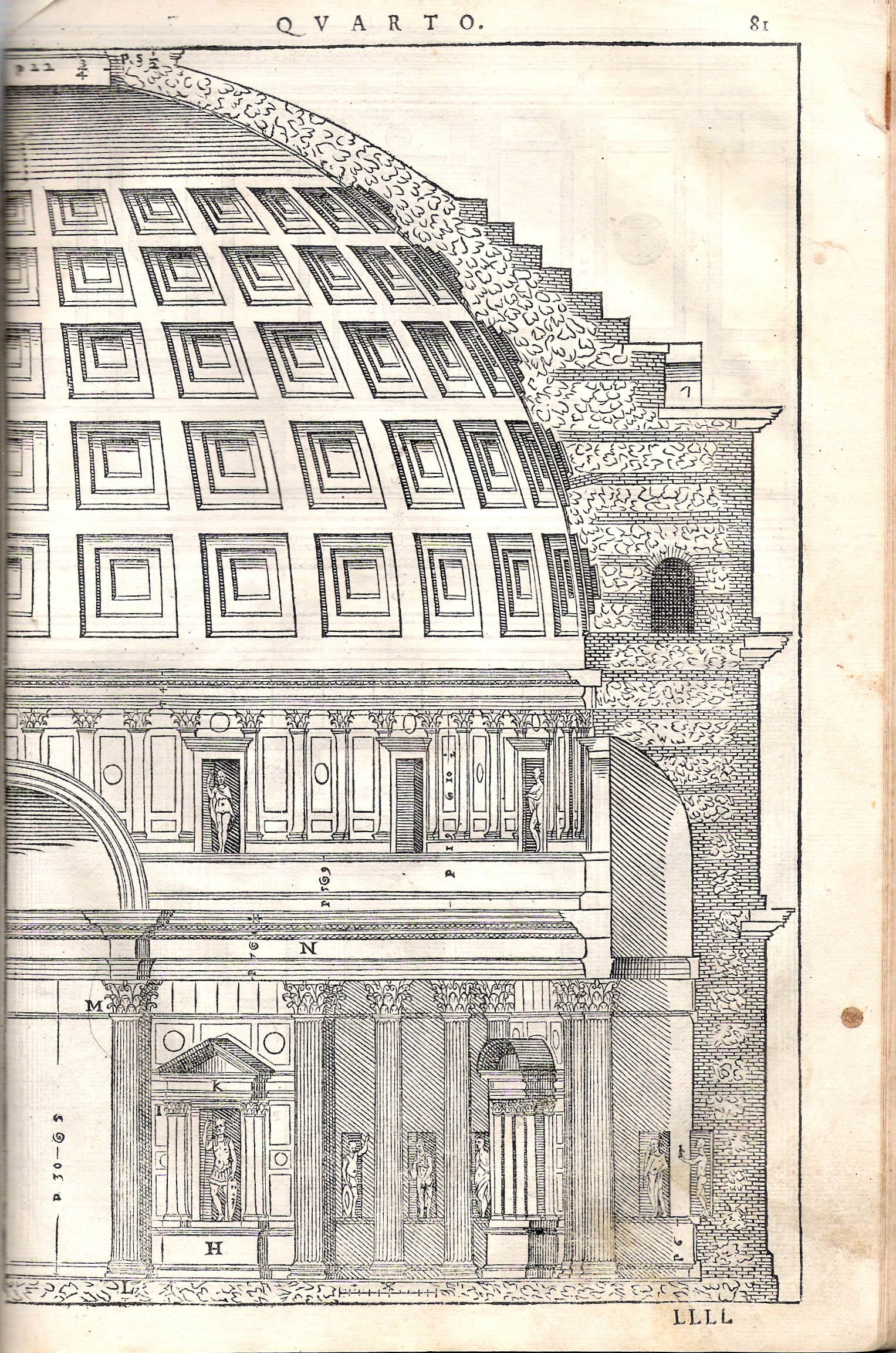 Andrea Palladio, "Quattro libri dell´architettura", prima edizione 1570 - Libro IV - Il Pantheon di Roma